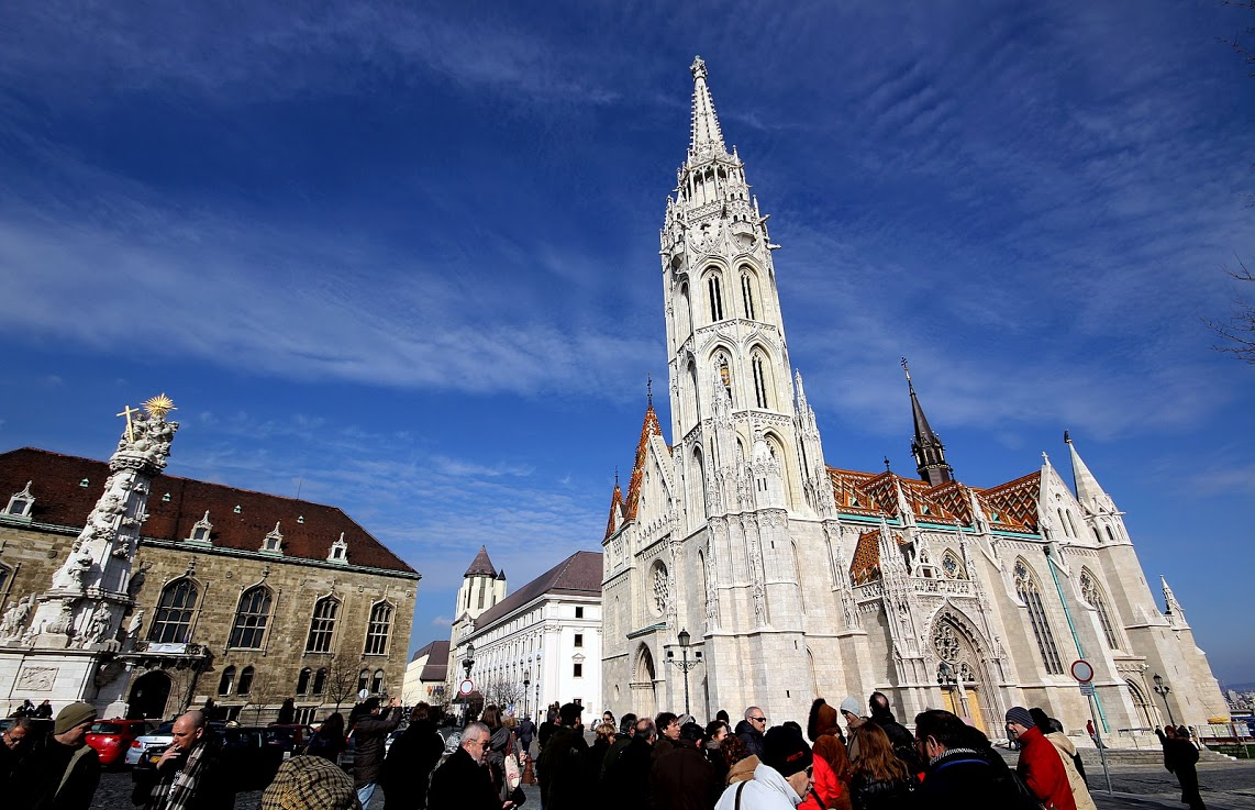 Szentháromság tér